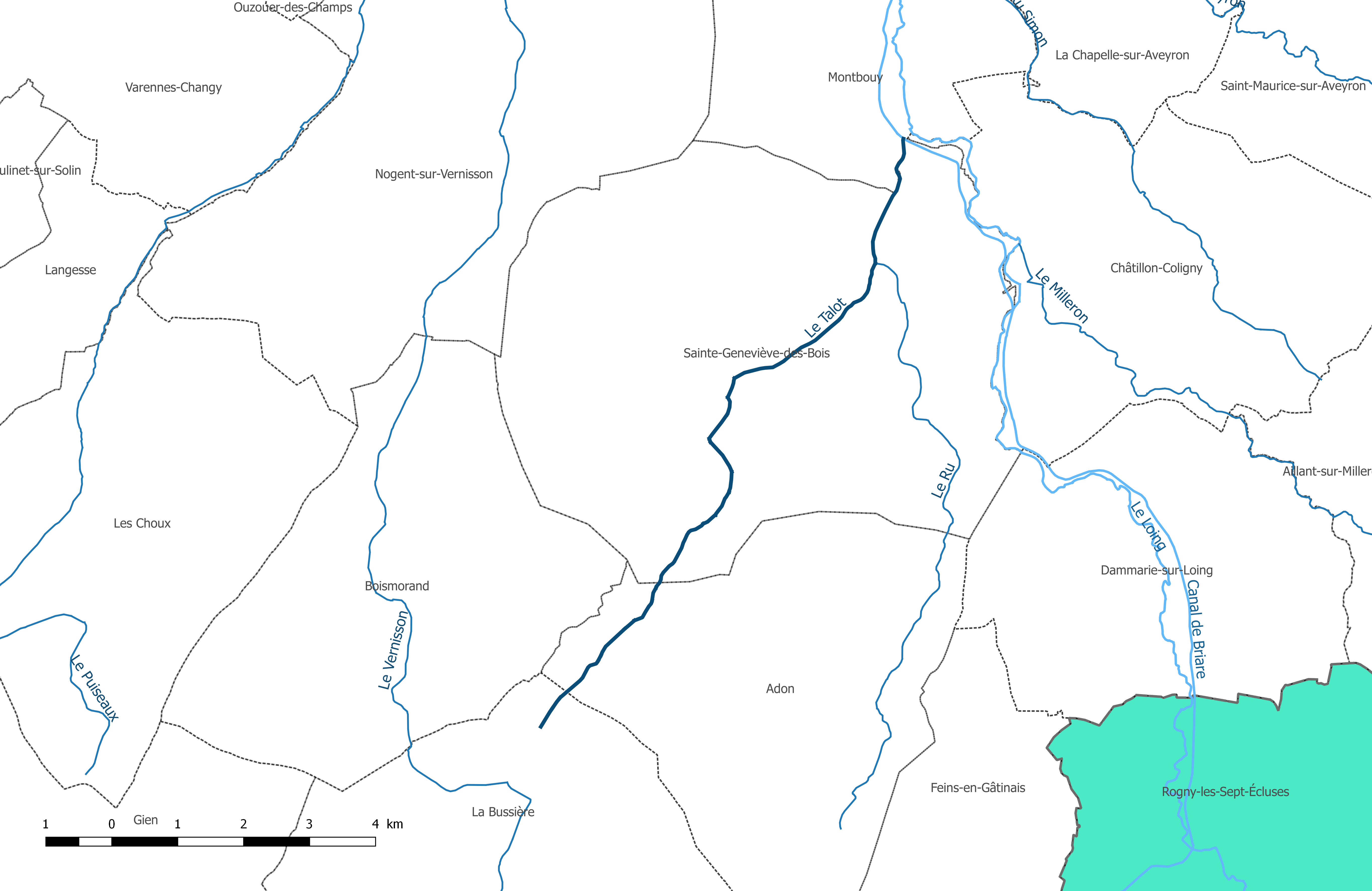 Carte du cours d'eau "le Talot", dans le département du Loiret.